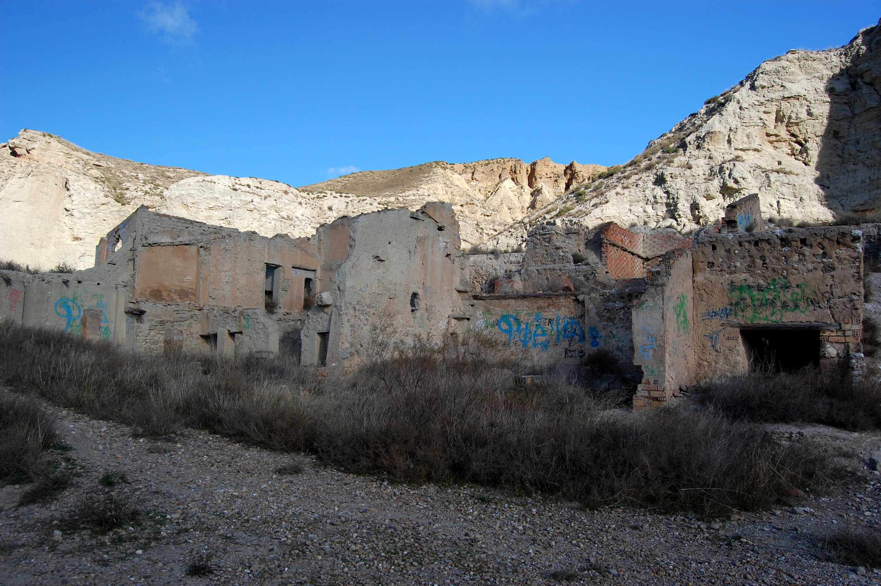 Hornos de yeso abandonados en Juslibol (Zaragoza, España).